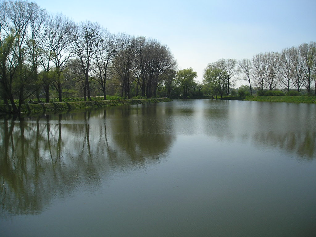 Devínskononoveský rybník